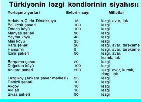 Список лезгинских сел в Турции. #Дагестан #Лезгины #Турция